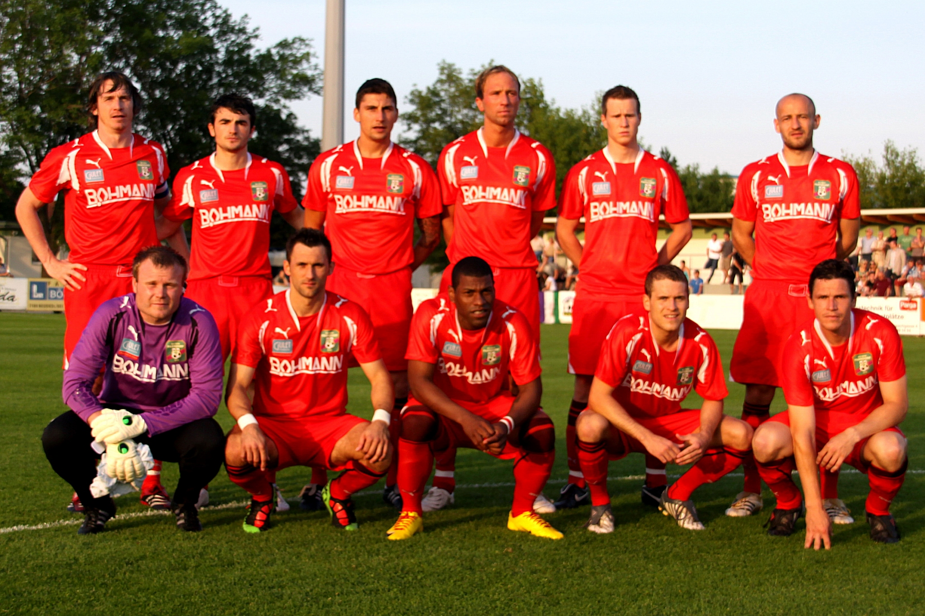 Die Mannschaft des SC-ESV Parndorf 1919 im ersten Relegationsspiel gegen den :de:Wolfsberger AC|Wolfsberger AC /SK St. Andrä (Ergebnis 1:0 für Parndorf). Das Bild zeigt (jeweils von links nach rechts) hockend: Markus Böcskör, Slaven Lalic, Severiano Alves Jailson, Dominik Friedl und Christoph Pomper; stehend: Christoph Jank (Kapitän), Furkan Aydogdu, Markus Pistrol, Patrick Kasuba, Michael Pittnauer und Stephan Helm (für die Spielernamen bitte mit der Maus über das Bild fahren).